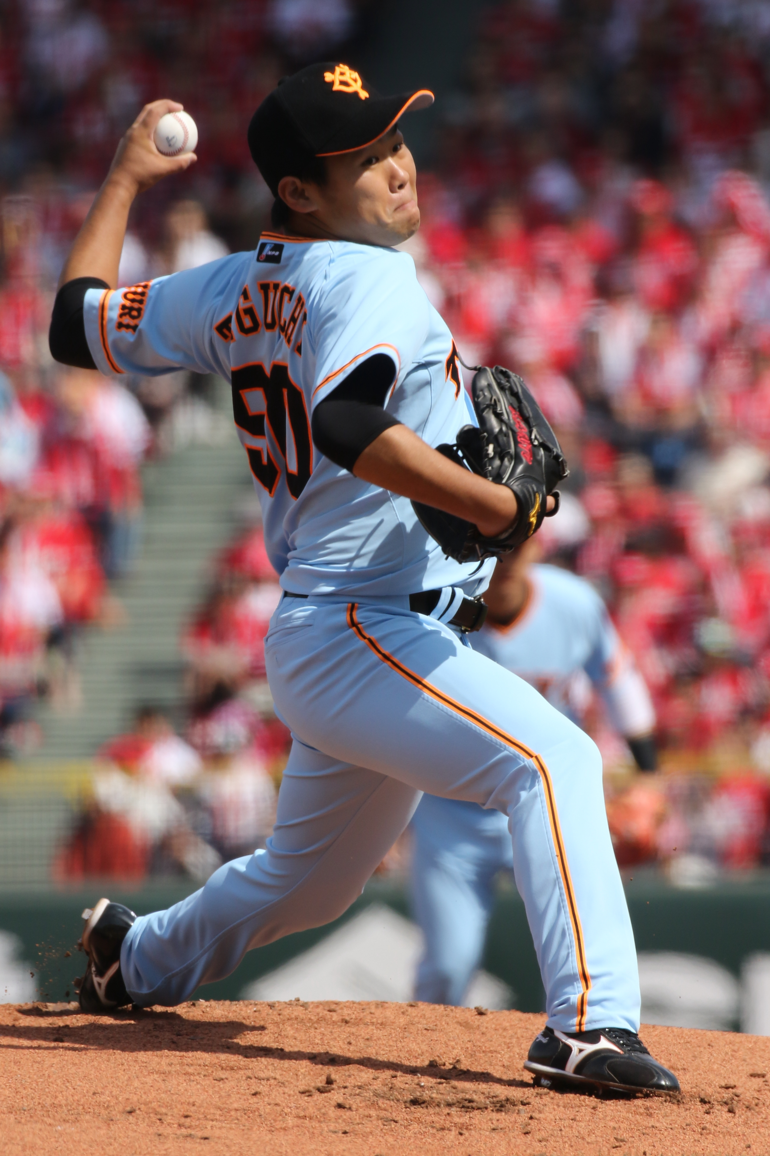 ジャイアンツ田口選手